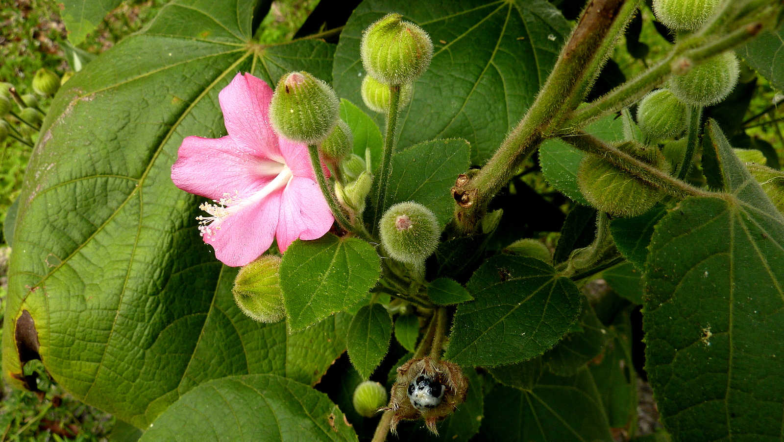 Pavonia malacophylla (Link & Otto) Garcke